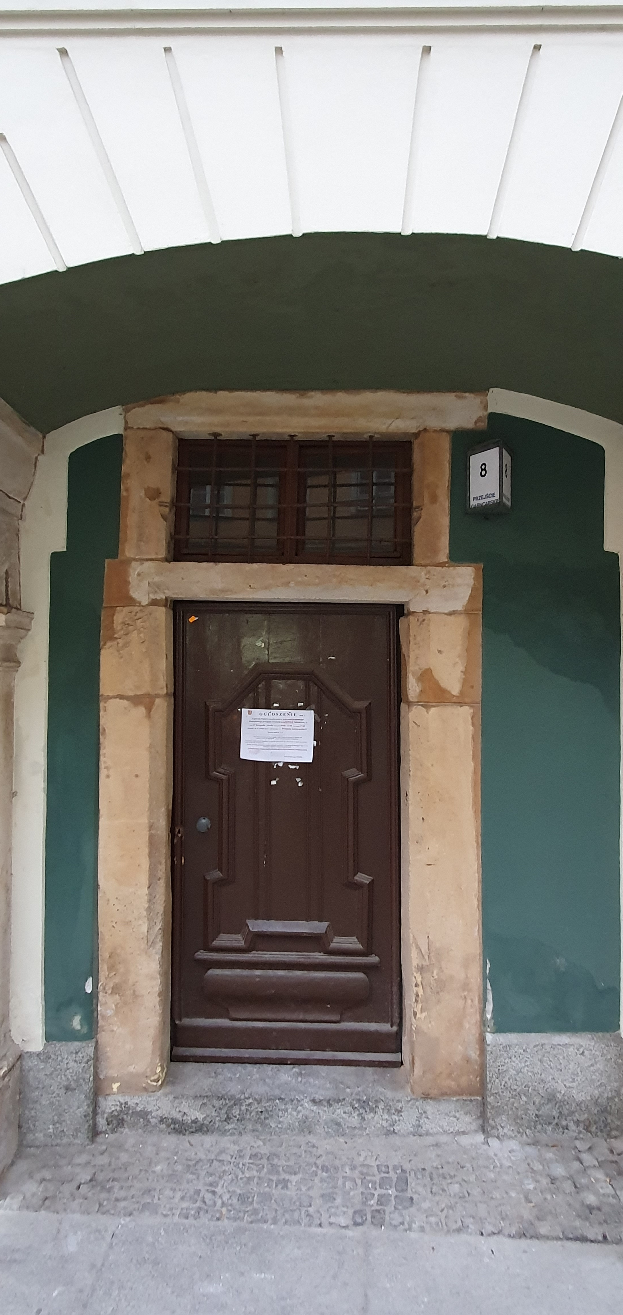 Renesansowy poral w kamienicy Przejście Garncarskie 8